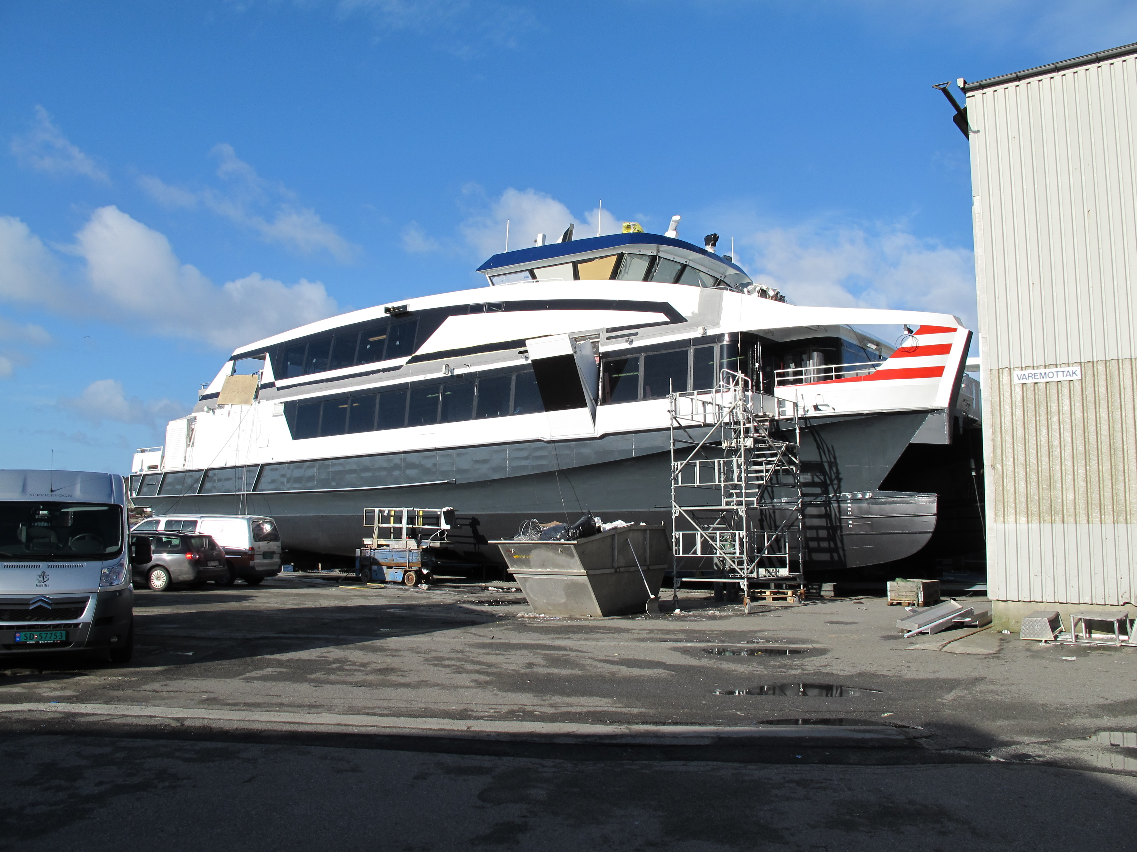 MS Njord ved Oma Baatbyggeri. Foto Harald Sætre